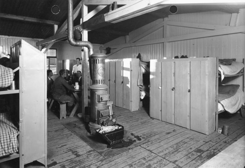 Wohnraum in einem Lager des RAD. Bildarchiv Franken, Reichsautobahnen-Oberste Bauleitung Nürnberg Autor: R.A.D.